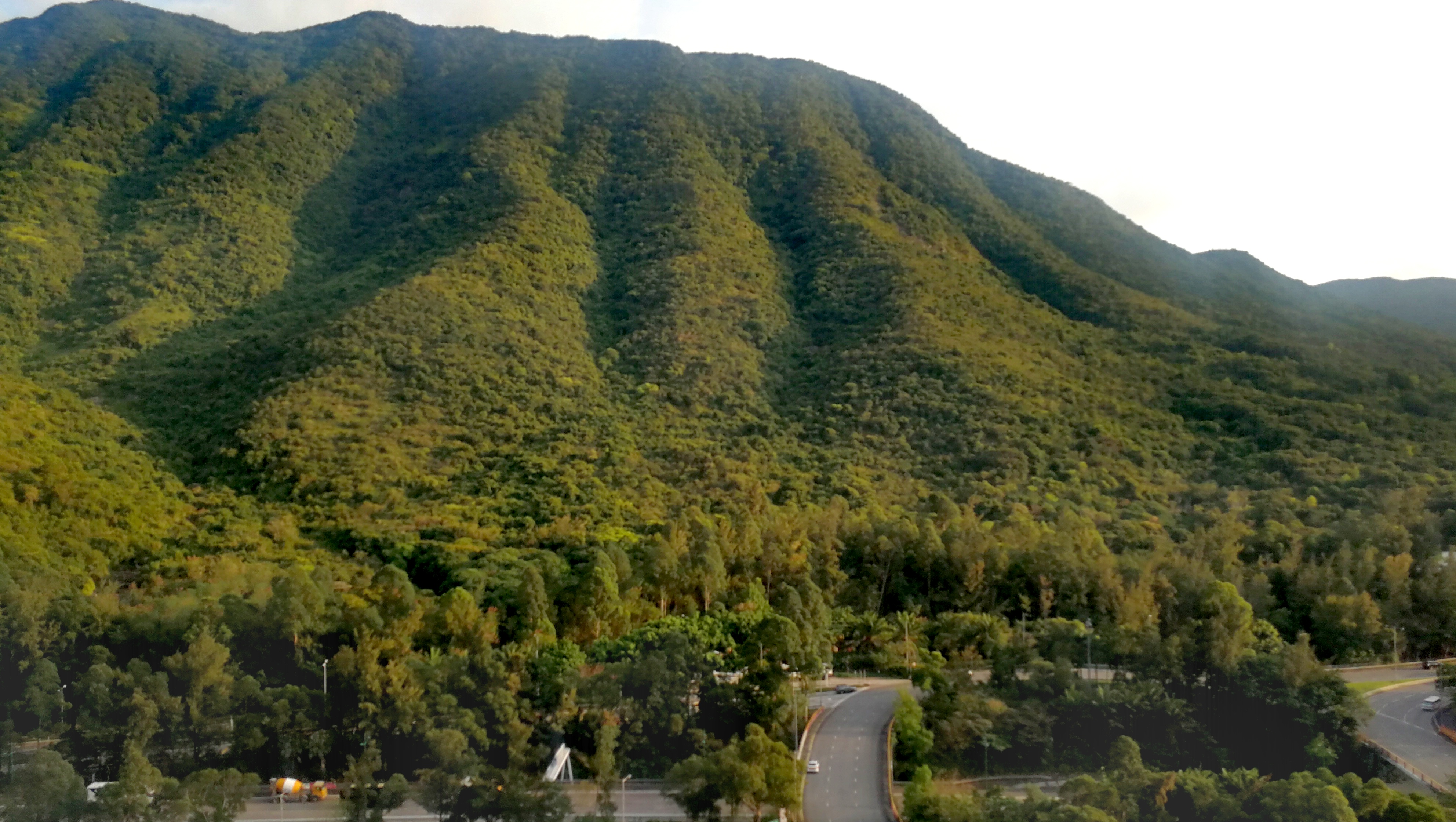 映灣園山景